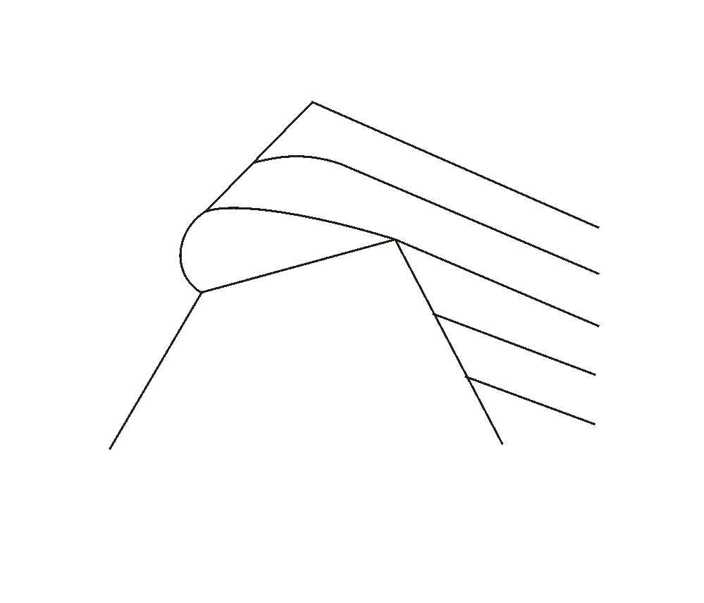 Kukla v ľudovej architektúre